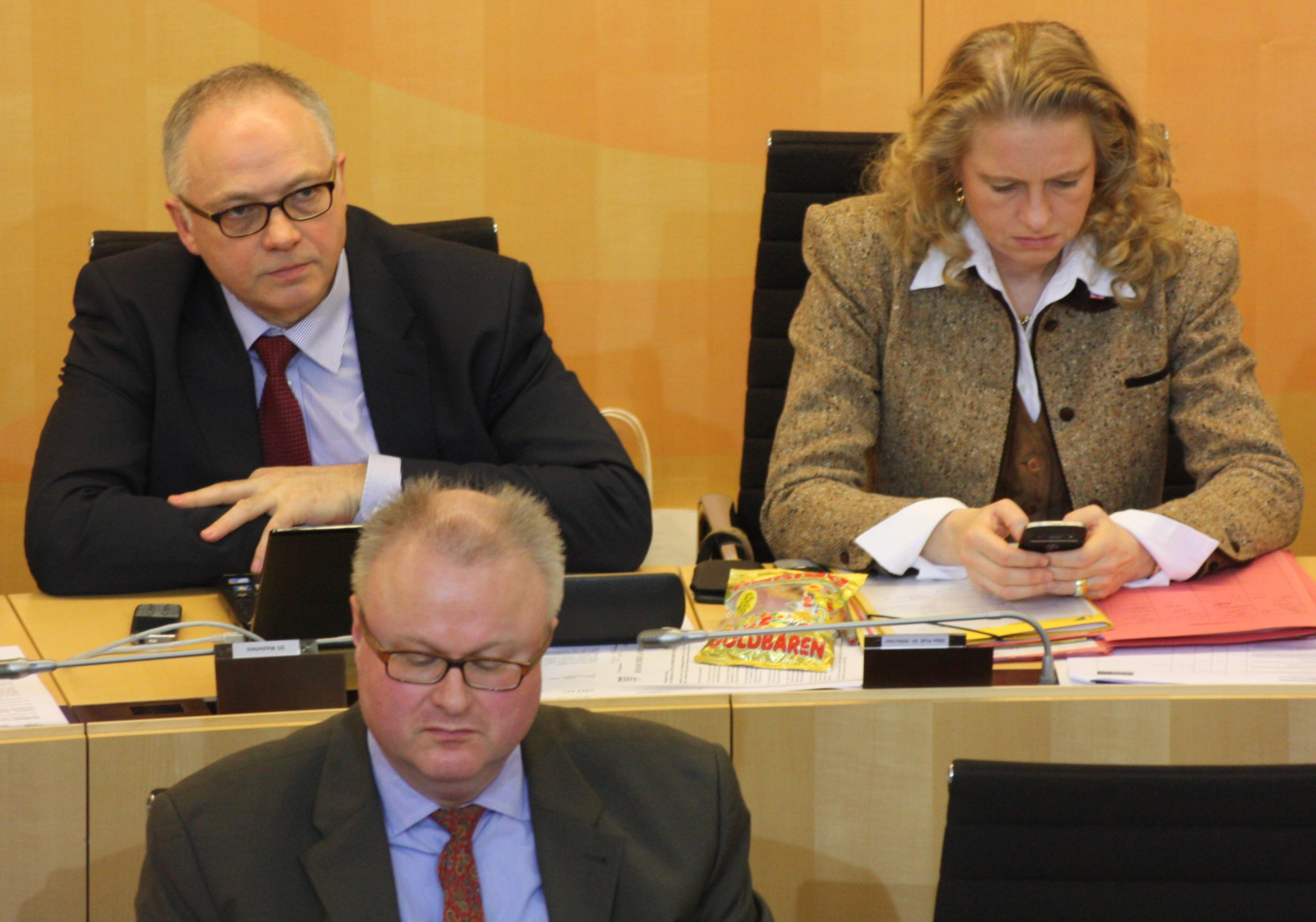 Der Hessische Finanzminister Thomas Schäfer und die Staatssekretäre Luise Hölscher undHorst Westerfeld im Hessischen Landtag